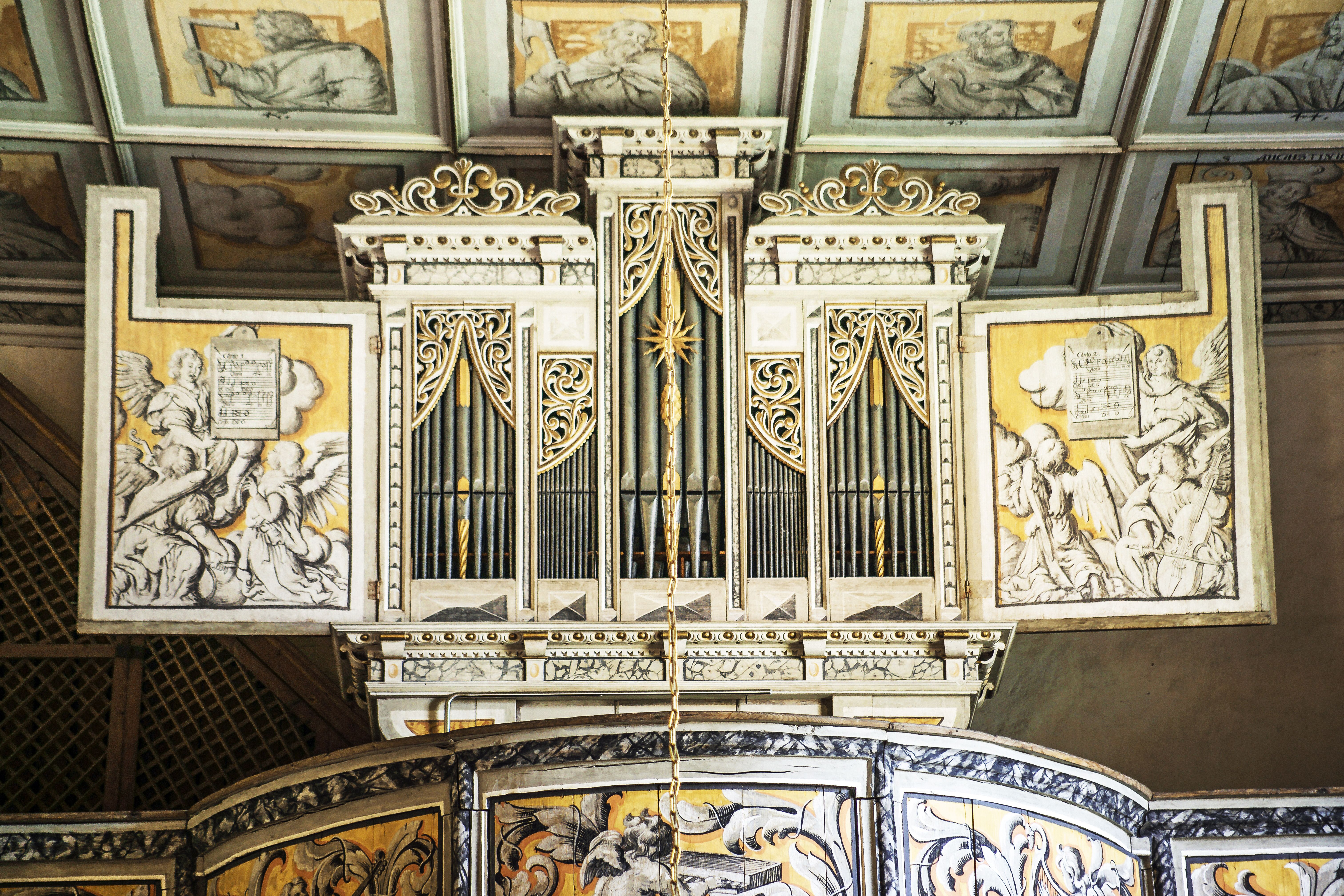 Wehrkirche Pomßen, Gemeinde Parthenstein, Landkreis Leipzig, Sachsen, Deutschland